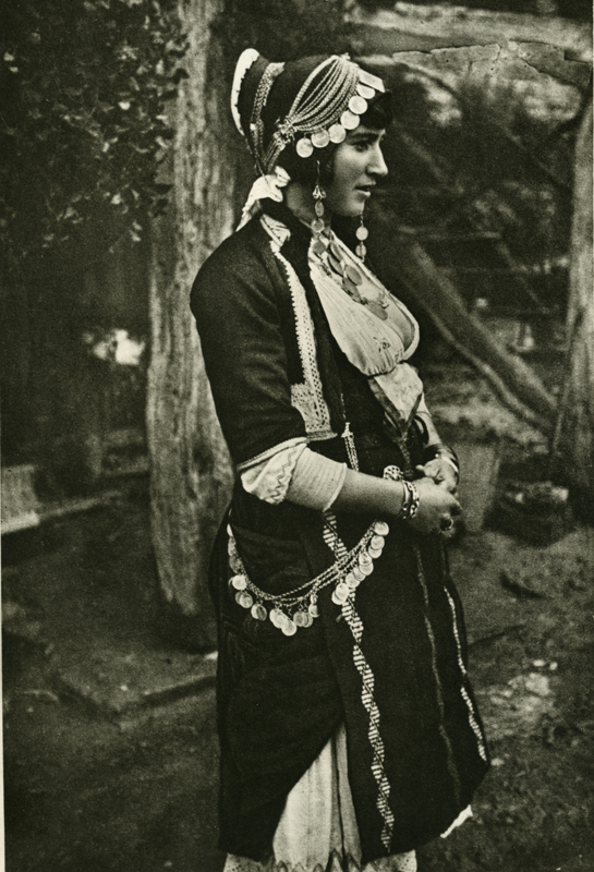 Φωτογραφία παντρεμένης γυναίκας με φορεσιά από τον Γιδά Ημαθίας.Μακεδονία. Αρχές 20ού αιώνα. Φωτογραφικό Αρχείο Πελοποννησιακού Λαογραφικού Ιδρύματος, Ναύπλιο